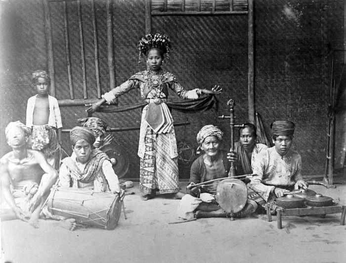 Repronegatief. Topeng Betawi danseres en muzikanten, Java